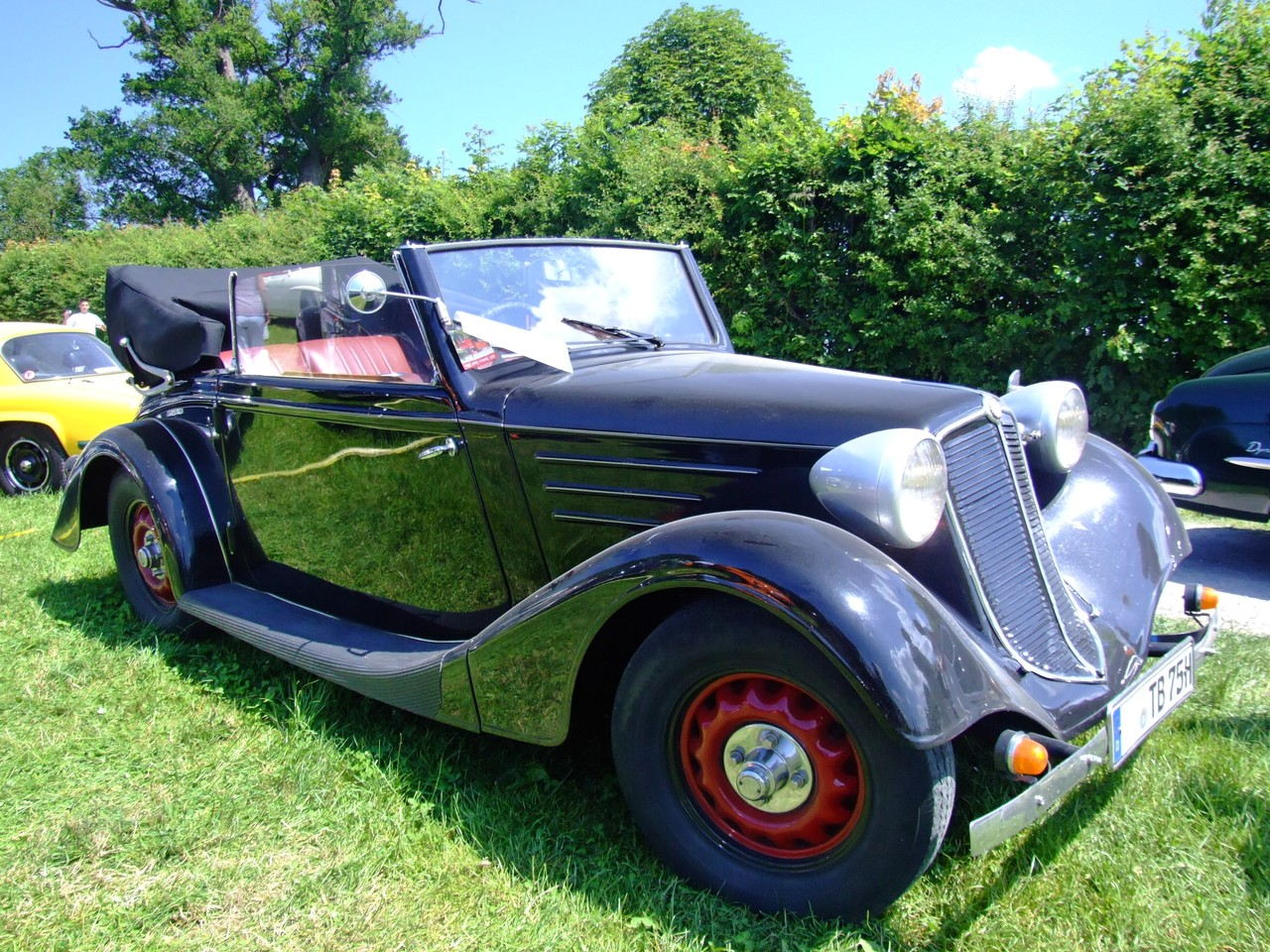 Tatra 75 Cabrio Baujahr: 1936 4 Zylinder - Boxer-Motor 1688 ccm 30 PS 3500 U/min. Quelle: selbst fotografiert, 06/2007 Fotograf: Späth Chr.